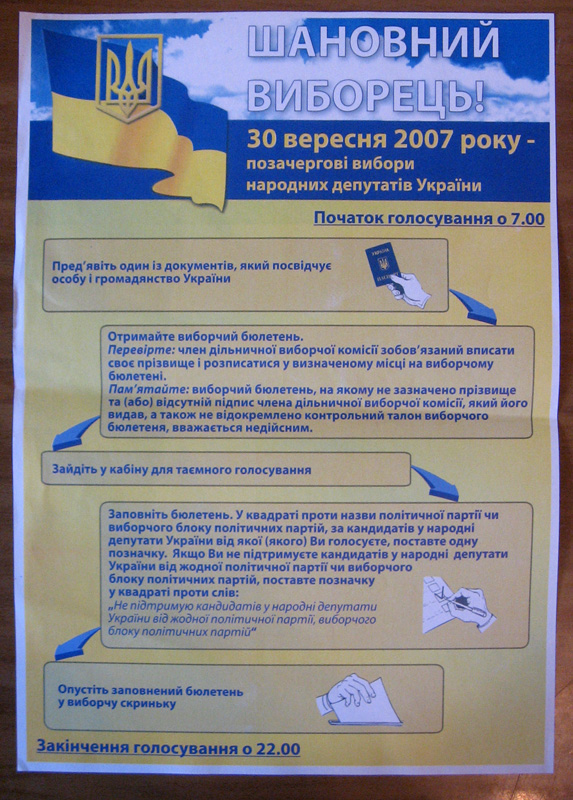 Инструкция по голосованию для избирателей на парламентских выборах в Украине, 2007